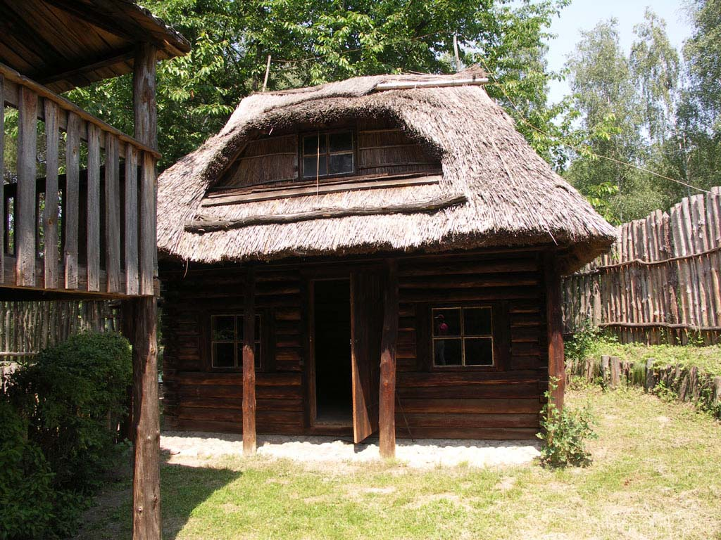 Skansen in Mrówki/Polen